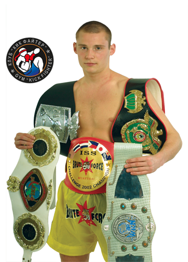 Василий Шиш — чемпион мира.